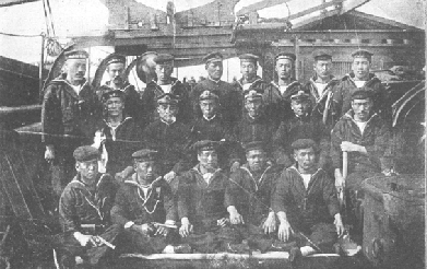 第三回旅順閉塞隊三河丸乗員